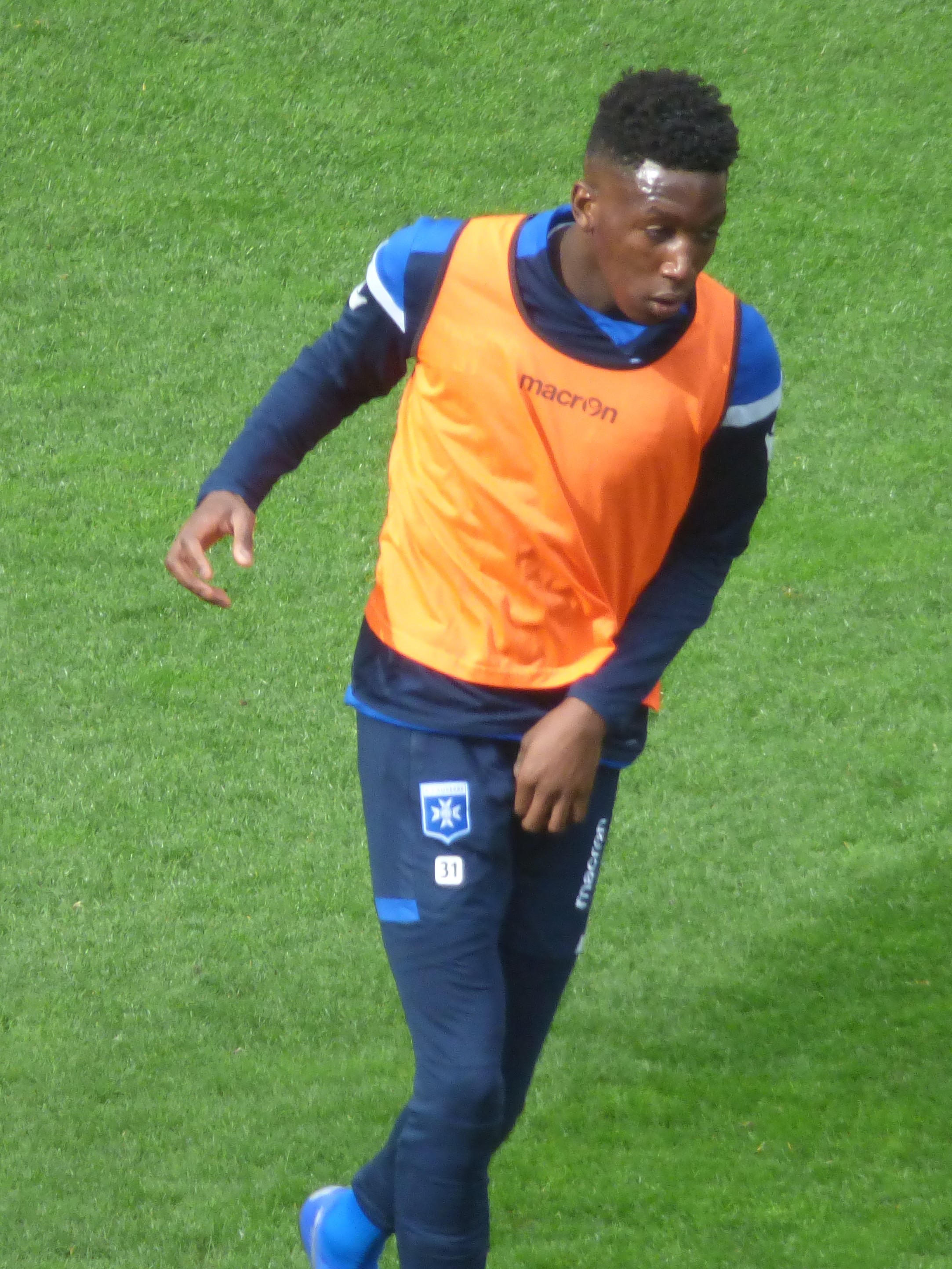 Lamine Fomba avant le match RC Lens - AJ Auxerre, comptant pour la 28ème journée du championnat de France de football de Ligue 2 2018-2019, le 9 mars 2019 au Stade Bollaert-Delelis.